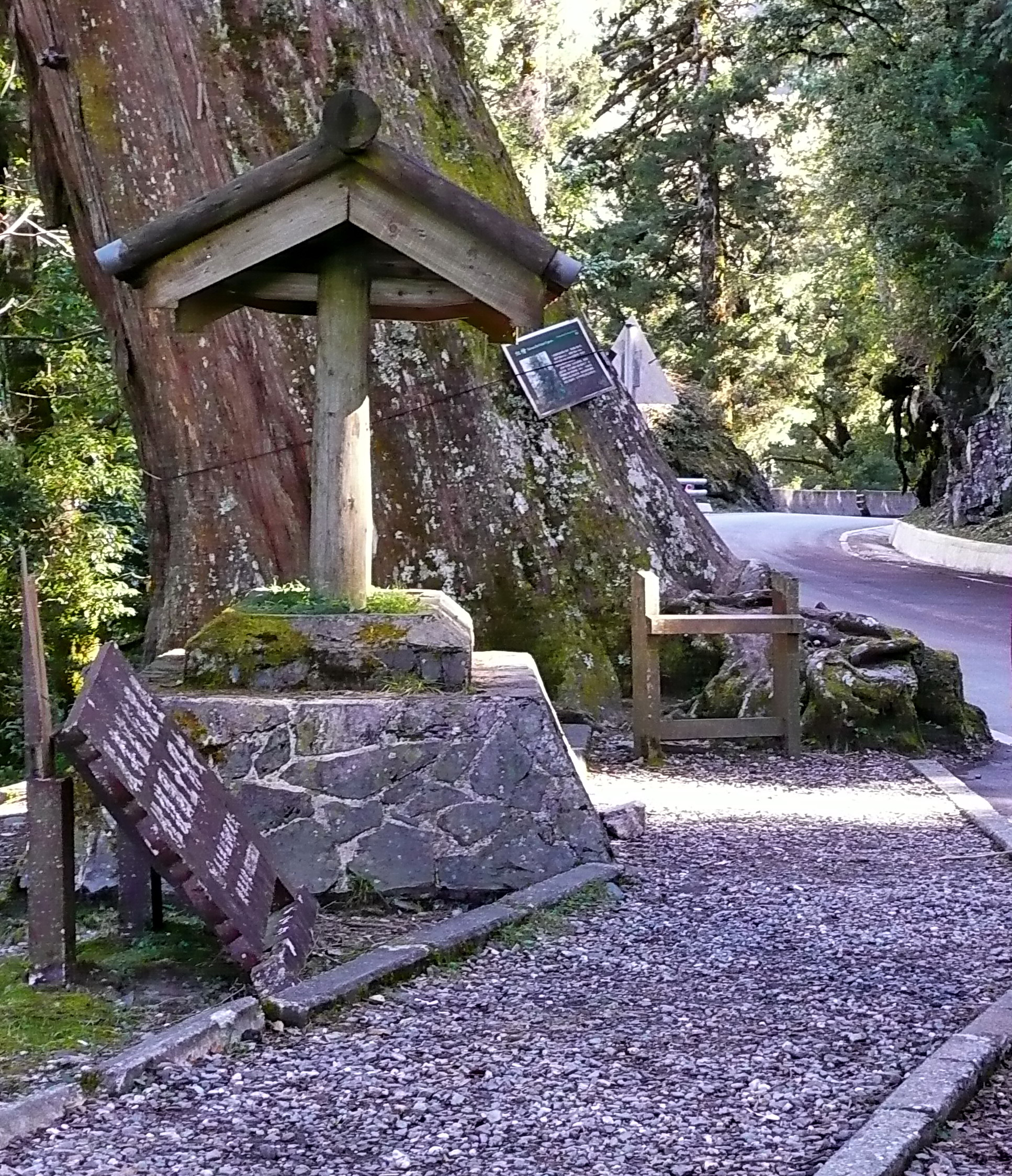 檜谷 Juniper Valley